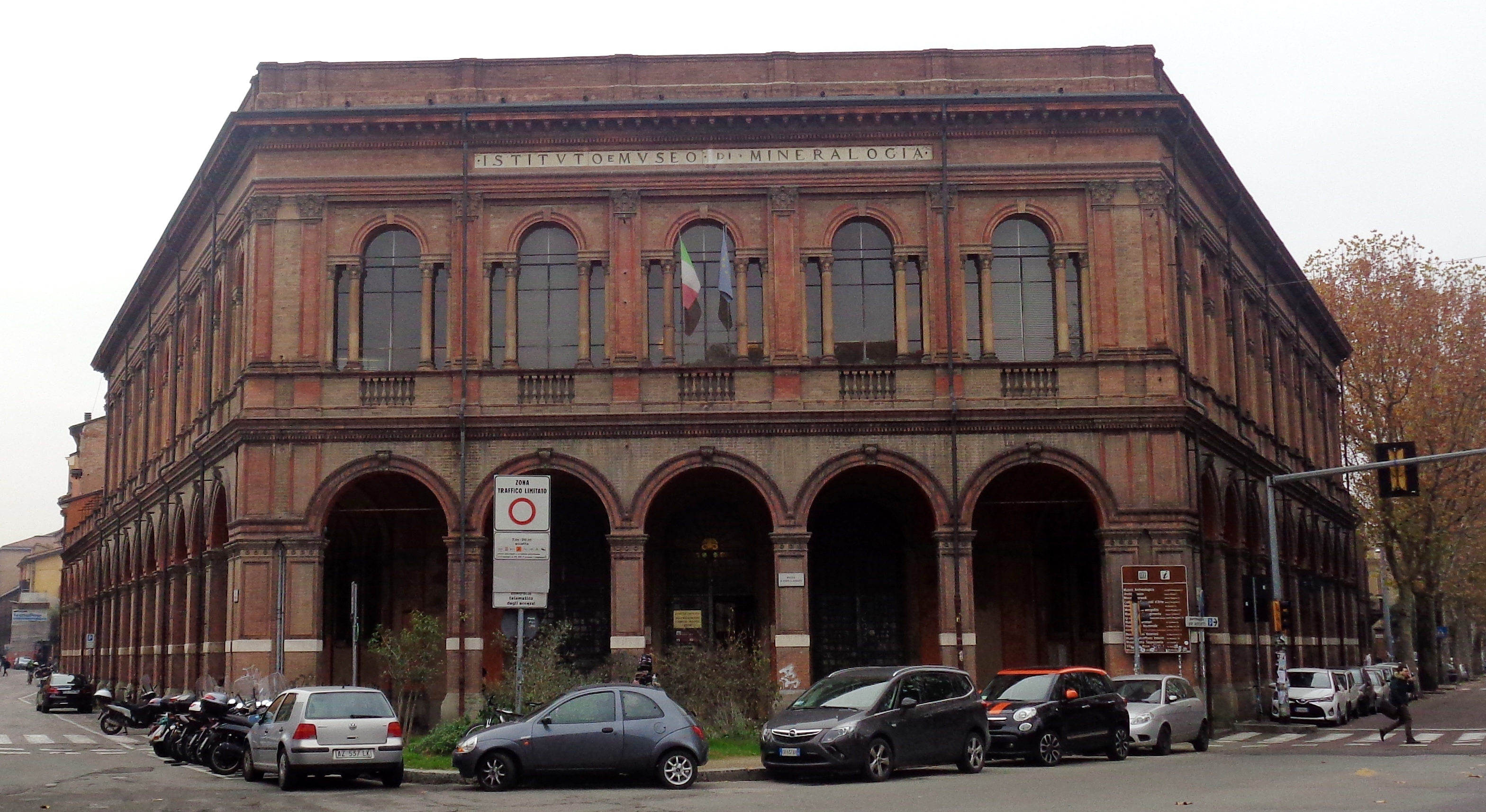 Istituto e Museo di Mineralogia, Università di Bologna